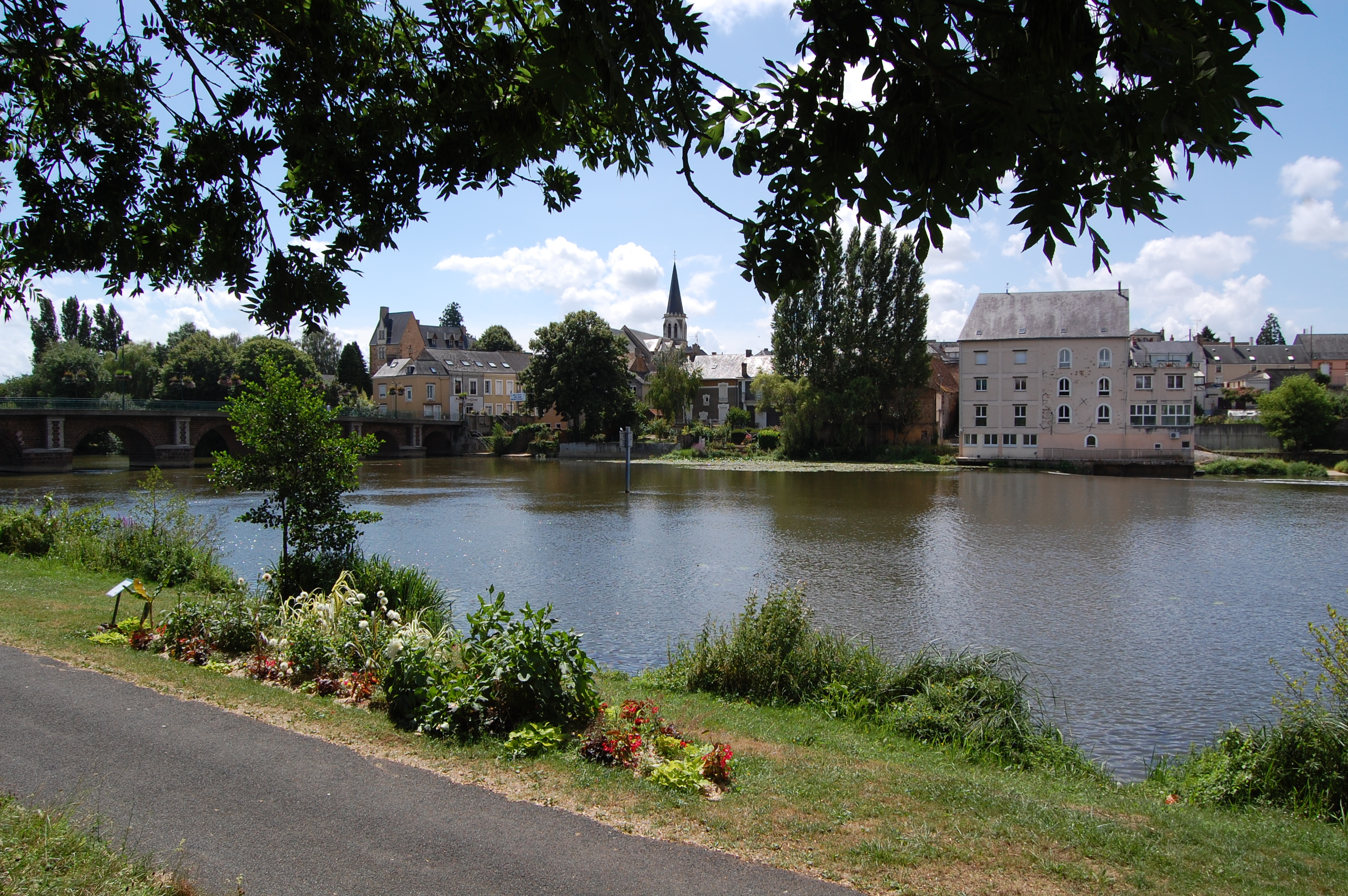 La Suze sur Sarthe vue du halage